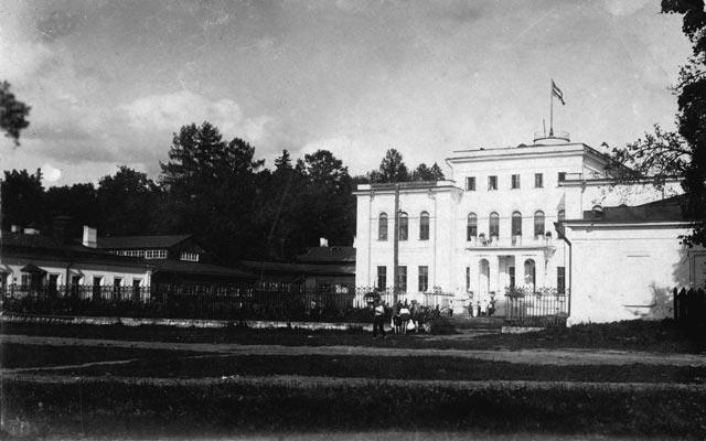 Bogorodskoye Manor